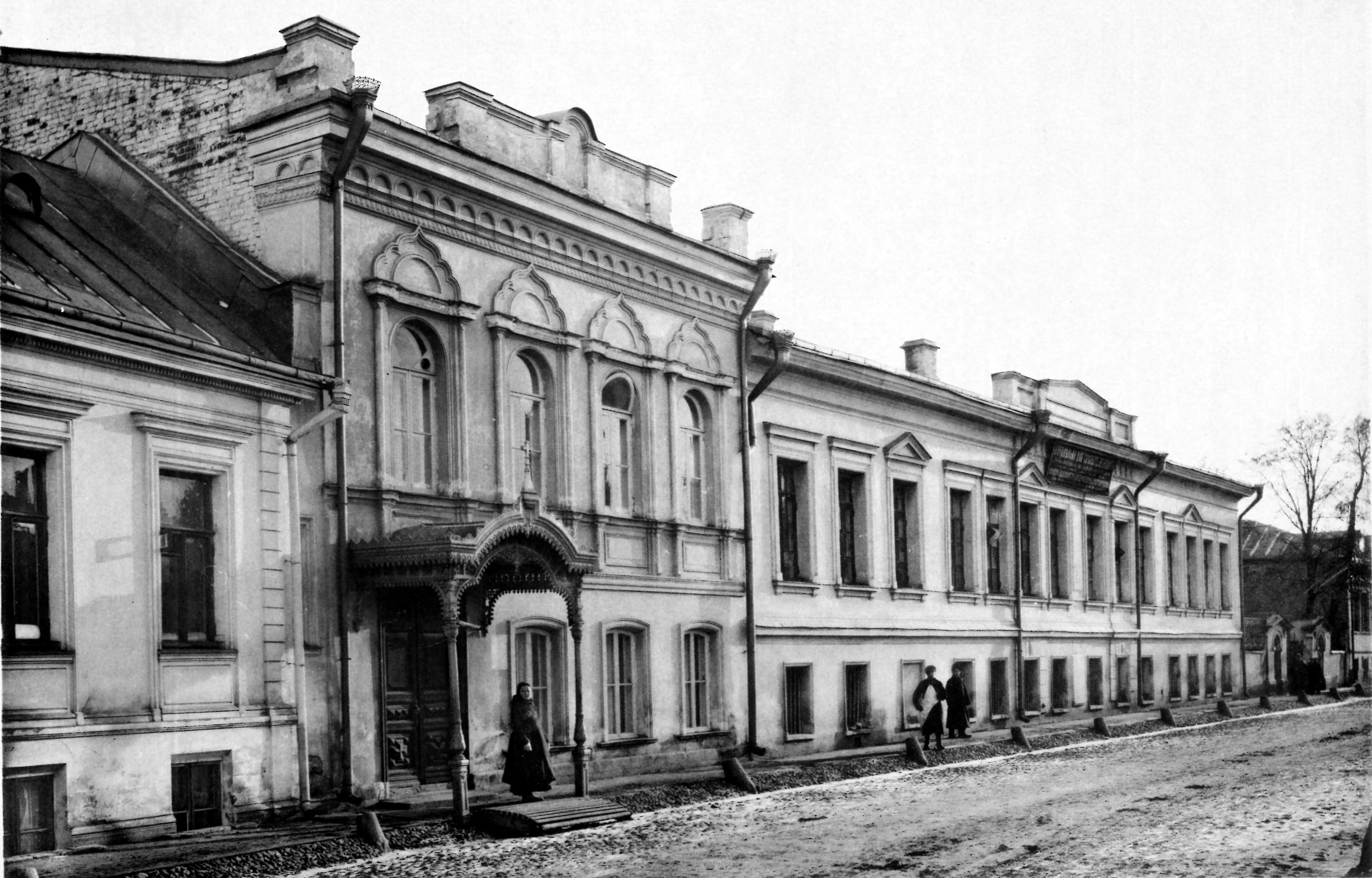 Богадельня для слепых женщин имени князя В. А. Долгорукова. Основана в 1845, М. Г. Дюклу, преобразована 1881 года В. Е. Чертовой.